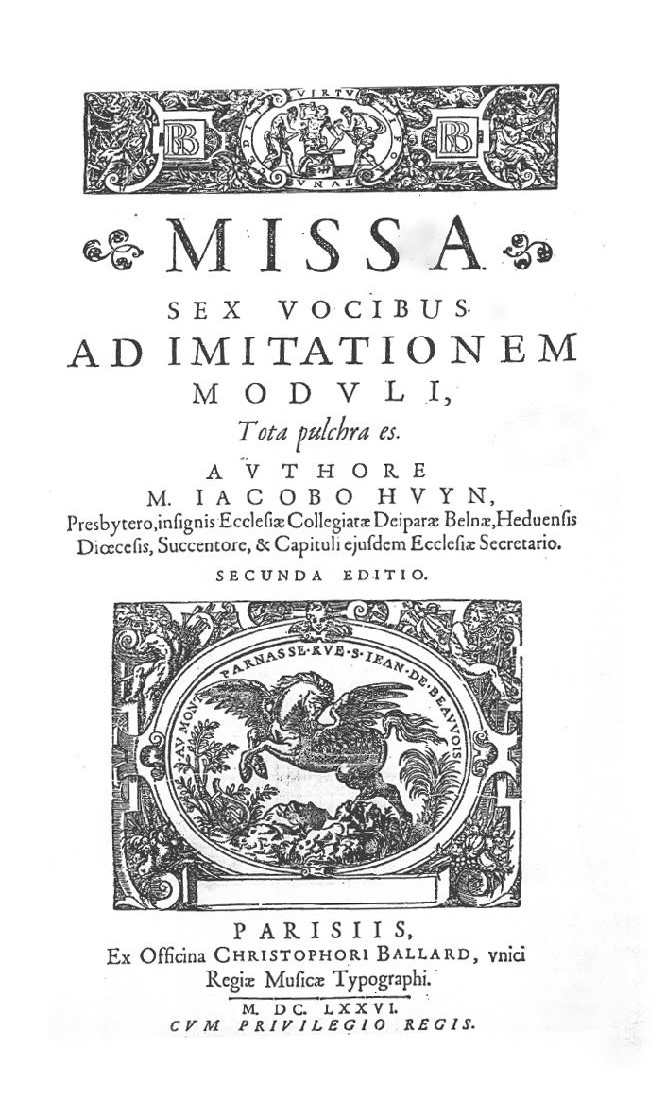 Title page of Huyn Missa Tota pulchra es (Paris, 1676).